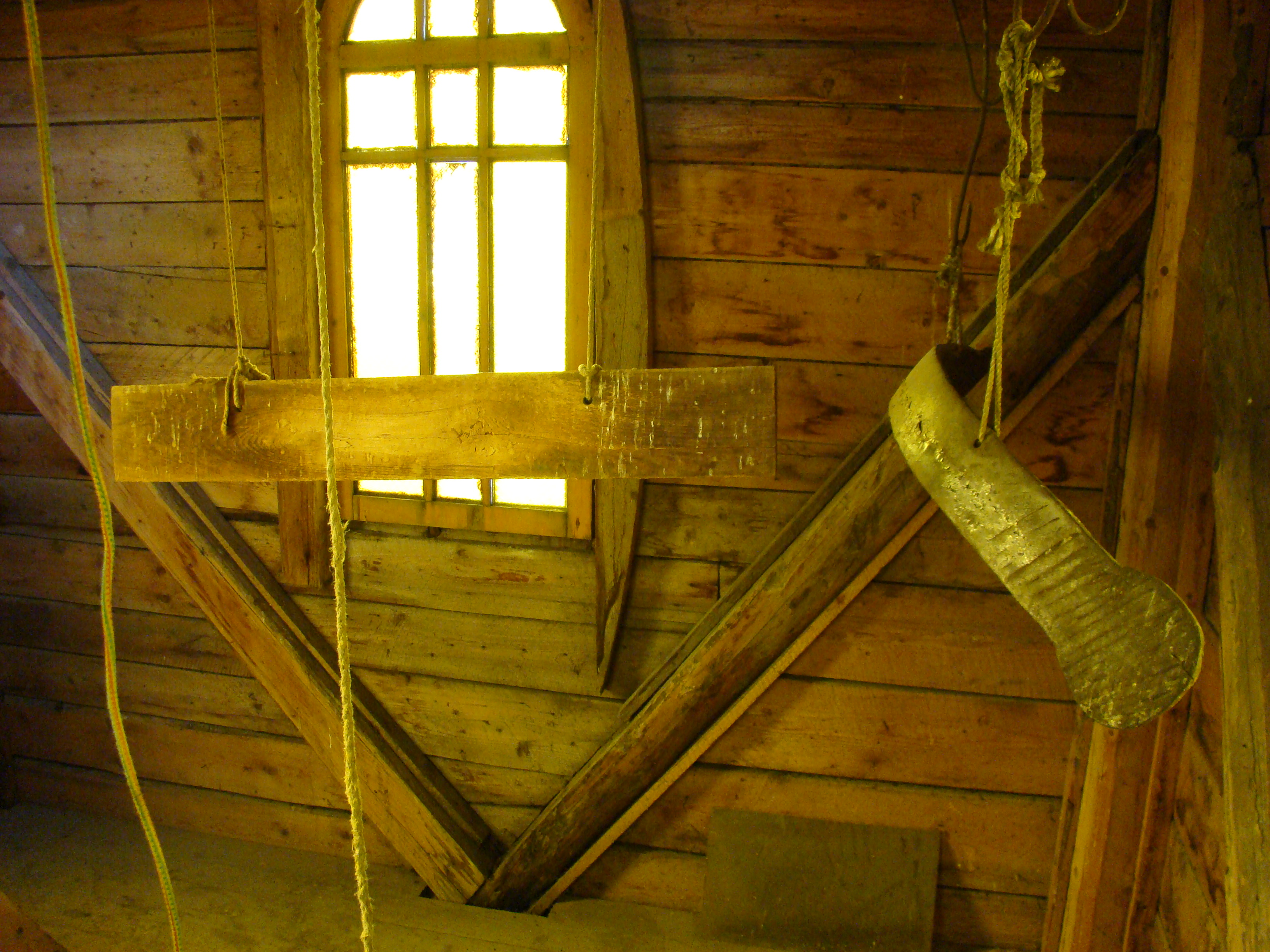 Biserica de lemn din Cisteiu de Mureş, Alba